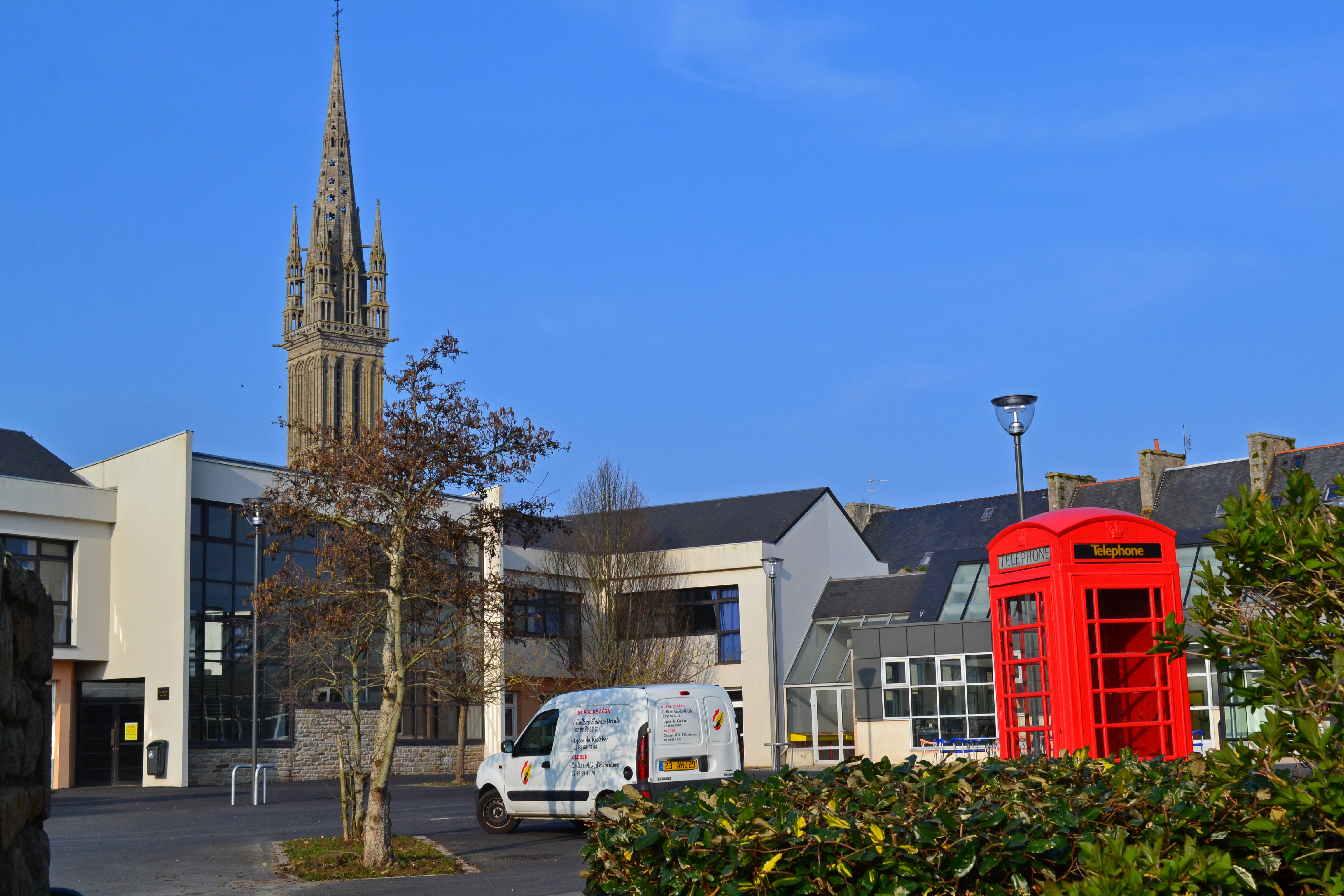 Forum du lycée du Kreisker devant la chapelle à Saint-Pol-de-Léon.